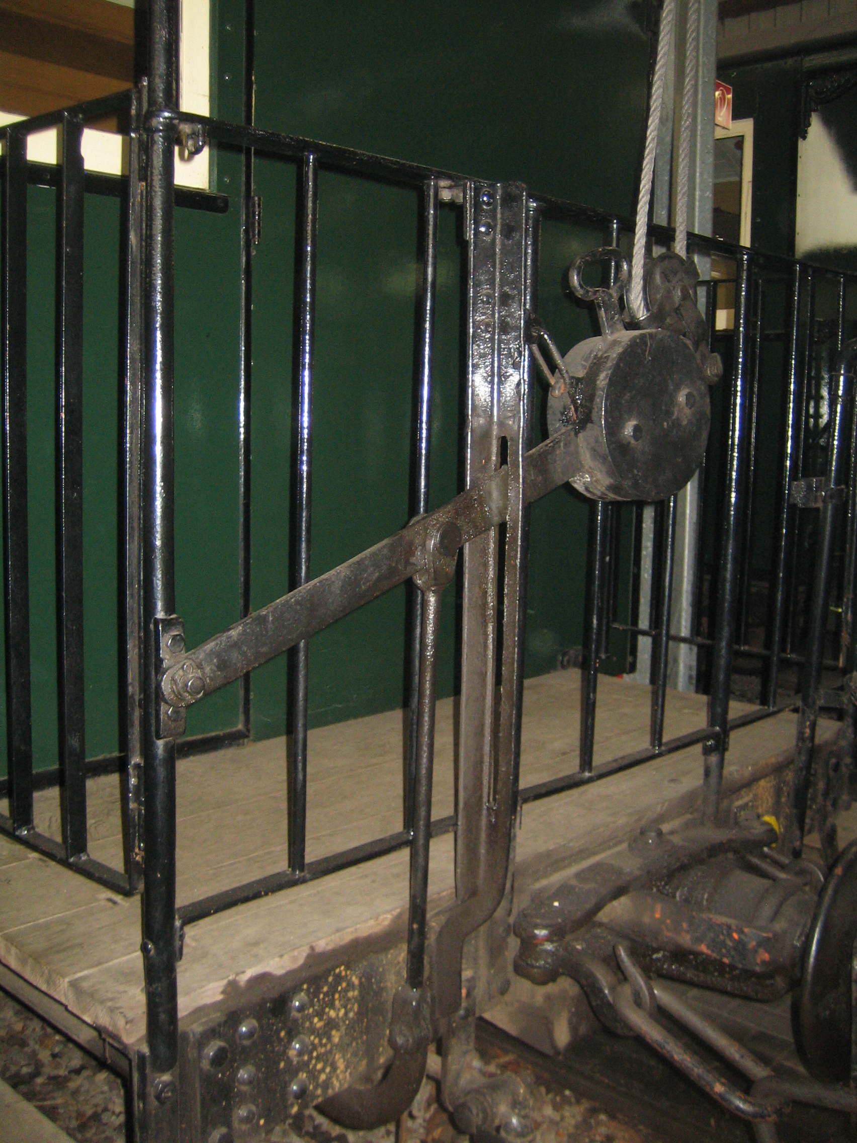 Bremshebel einer Görlitzer Gewichtsbremse